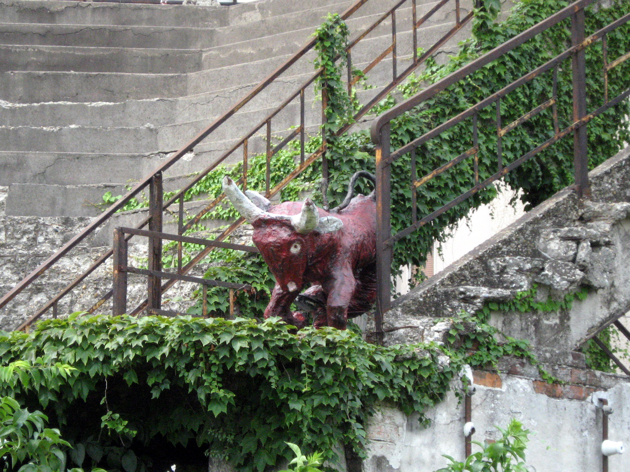 Old Filadelfia stadium in Turin